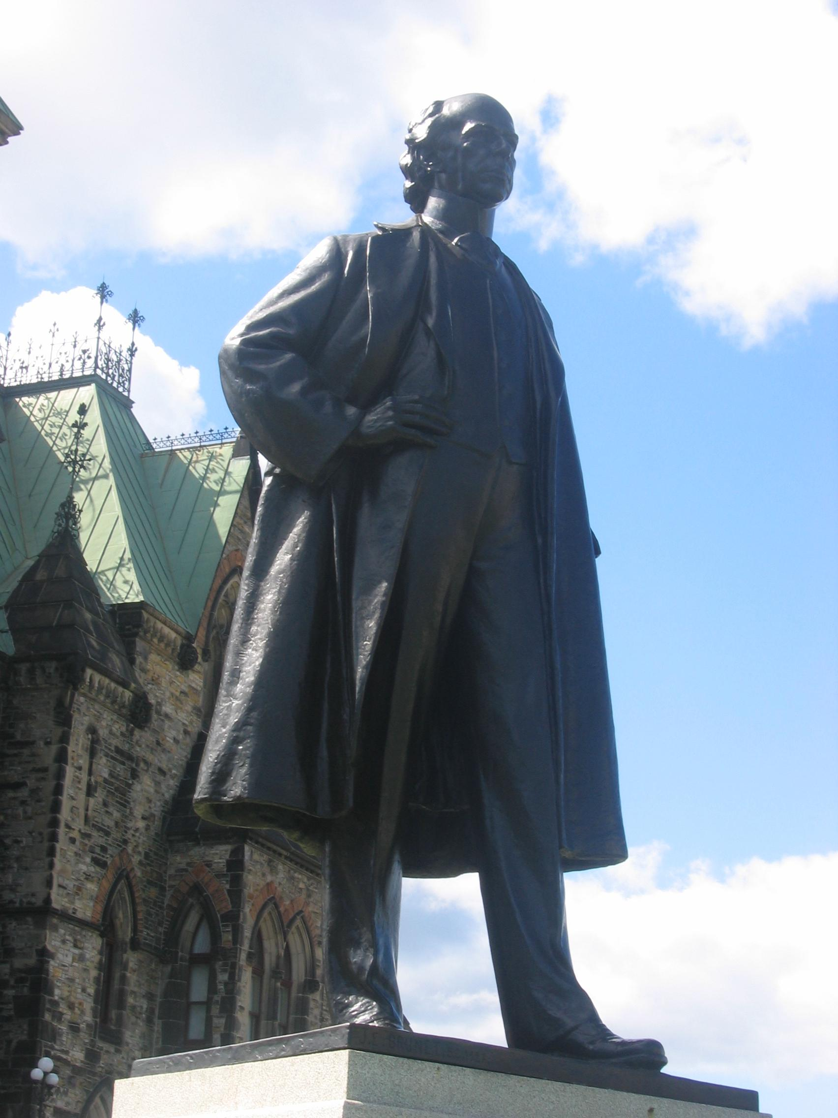 Statue de Wilfrid Laurier, Parlement du Canada, Ottawa